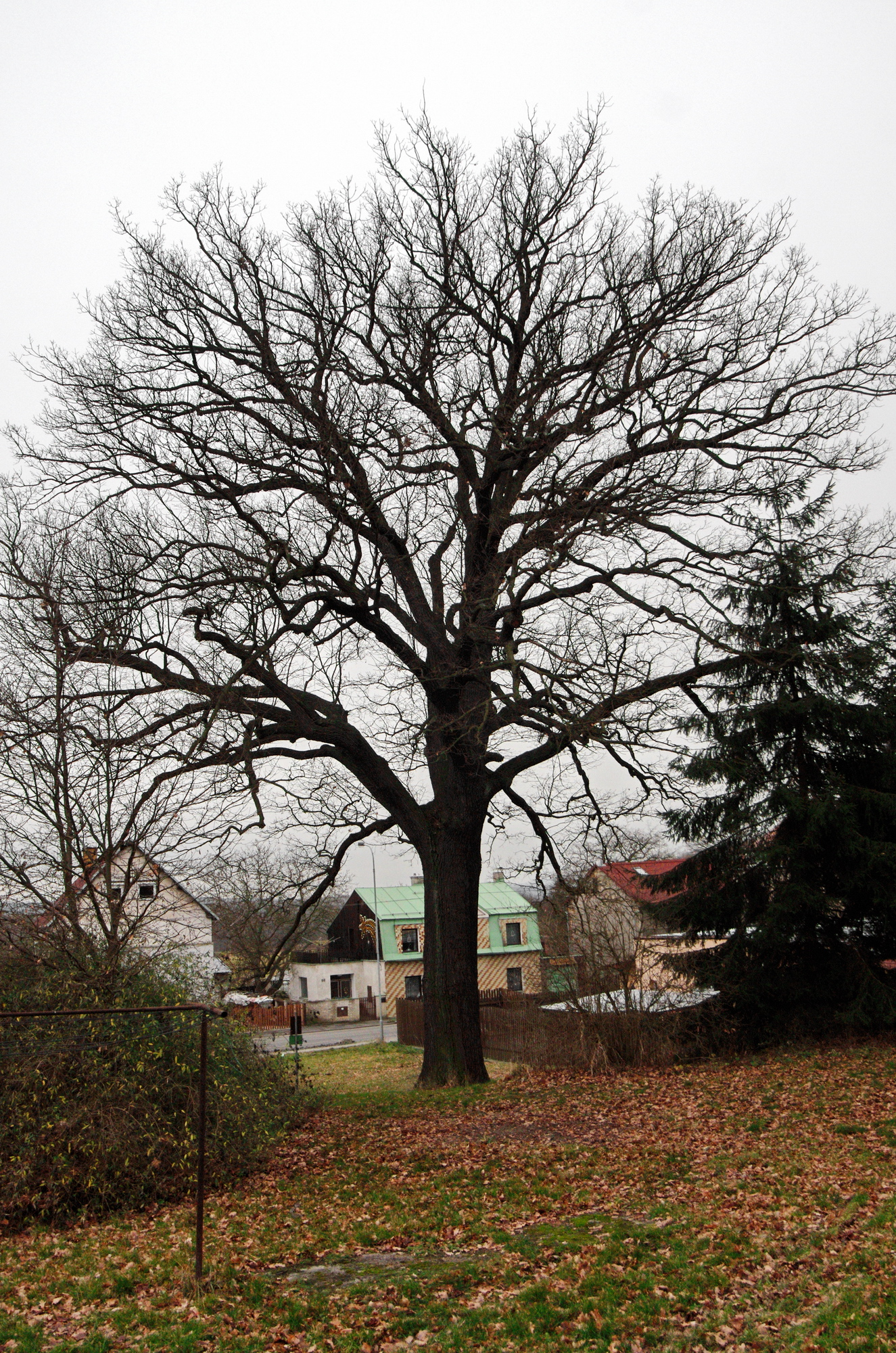 Památný strom Počerenský dub, Počerny (část města Karlovy Vary)